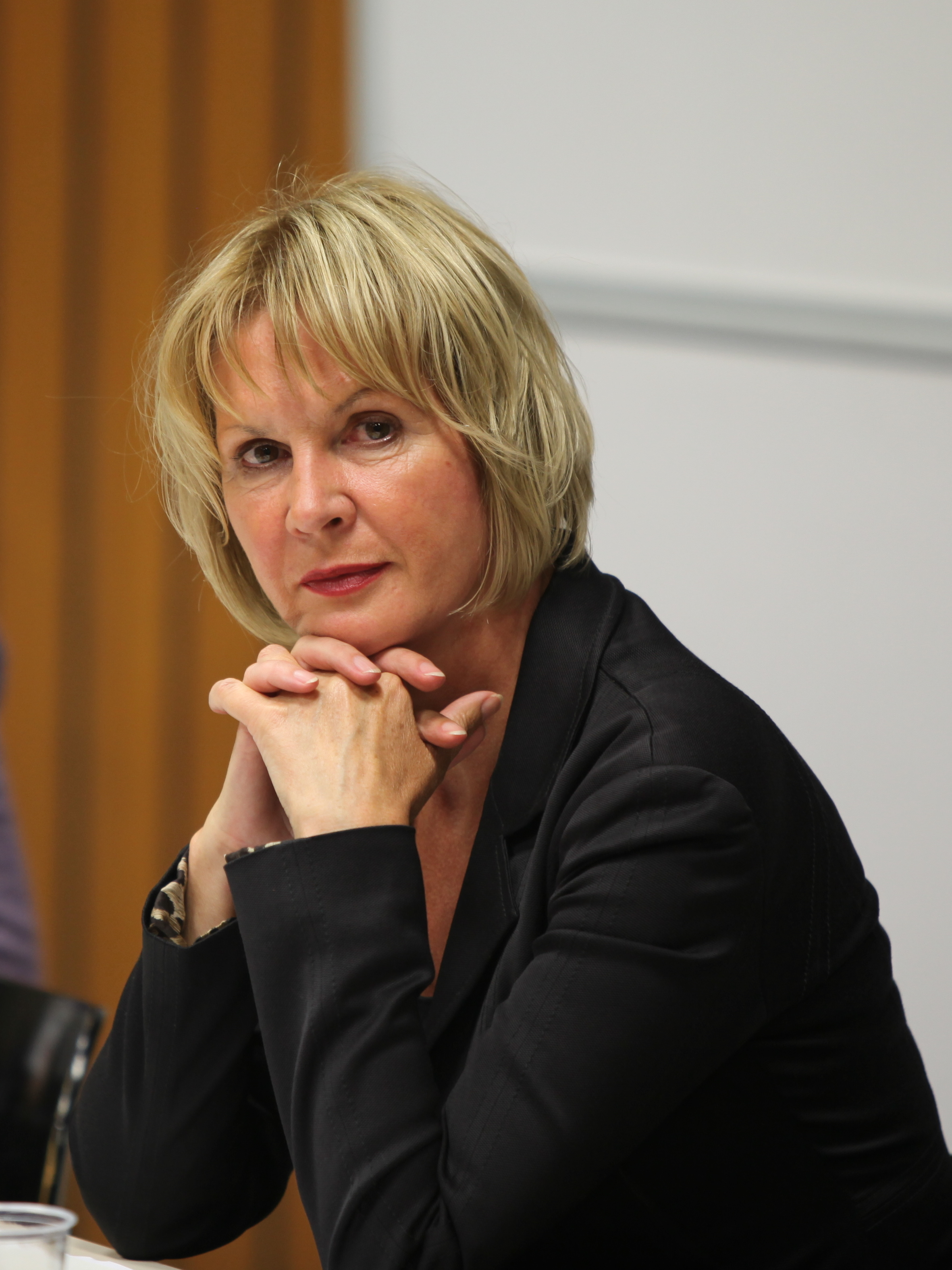 Brigitte Pothmer, Spitzenkandidatin der Niedersächsischen Grünen zur Bundestagswahl 2009